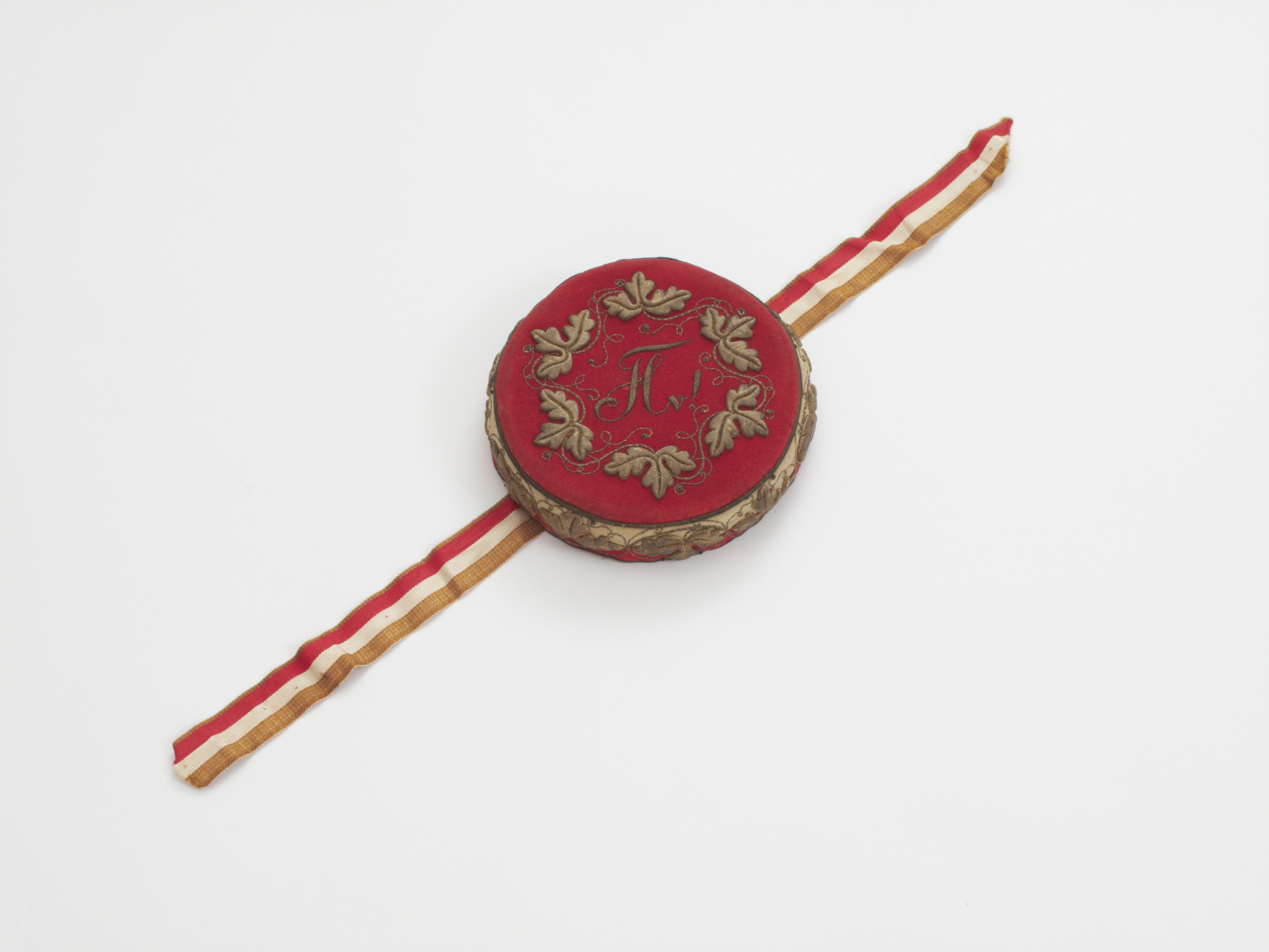 Band und Tönnchen eines Angehörigen des Corps Hansea Königsberg